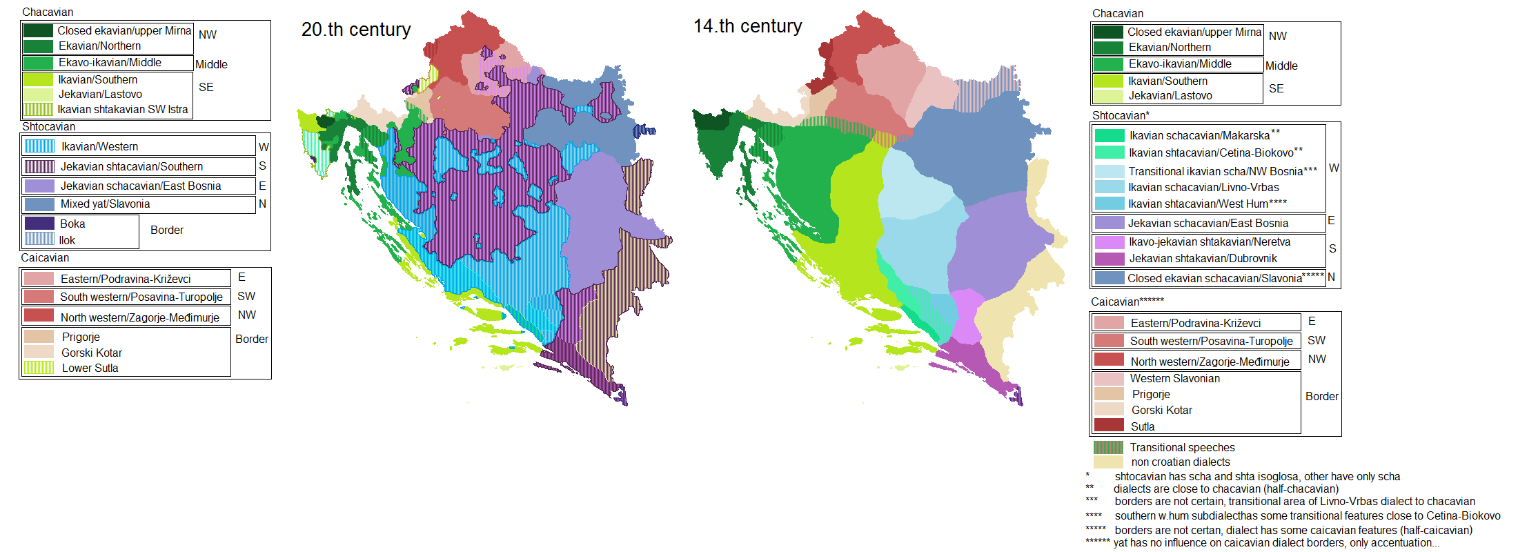 Usporedba hr. dijalekata između 14. i 20. stoljeća